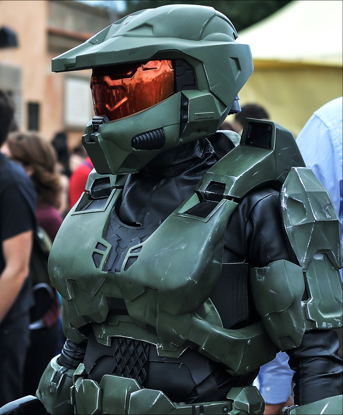 LC&G2